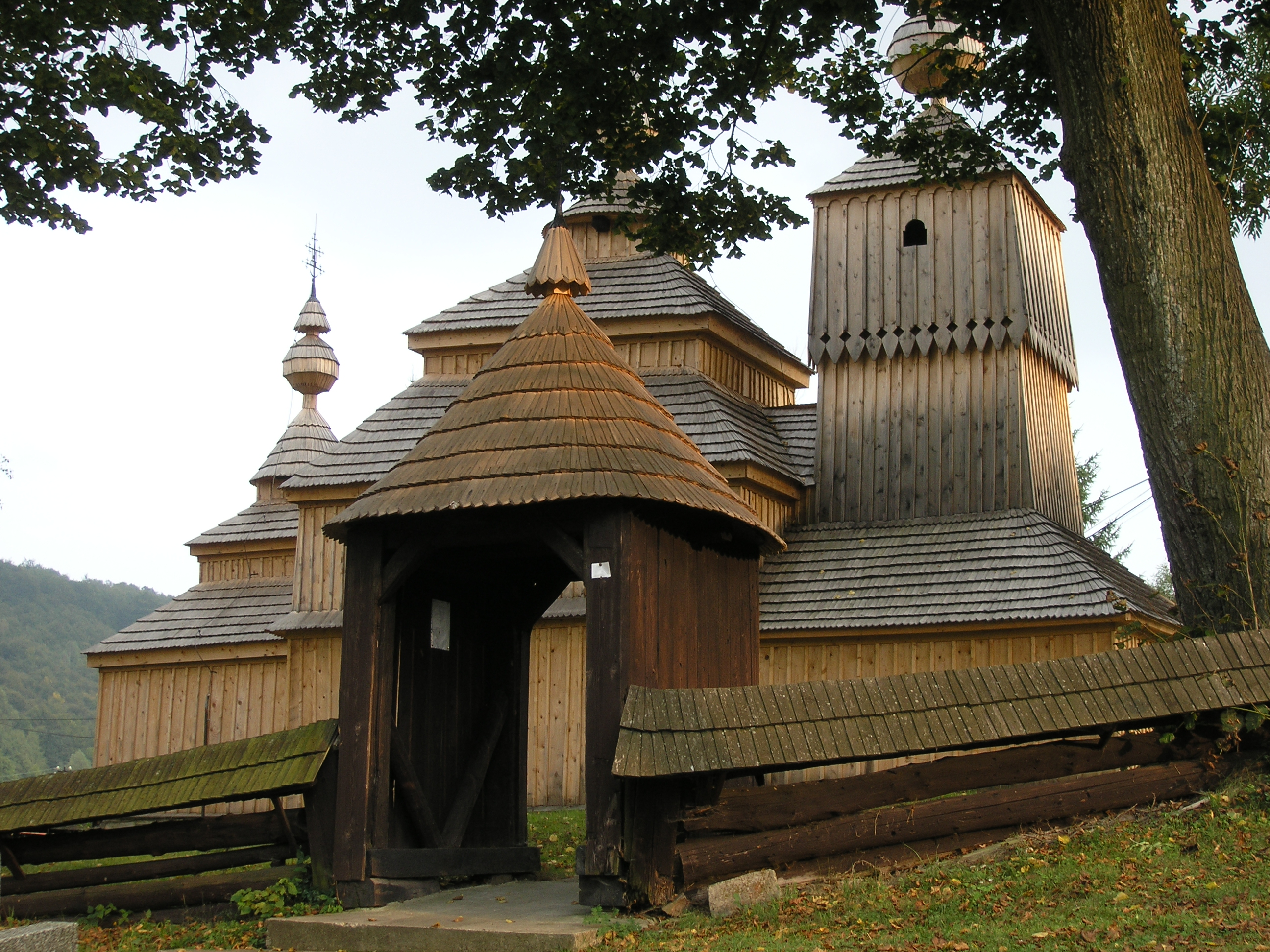 Bodružalská cerkov zo severnej strany je sakrálna stavba s doznievajúcimi byzantskými vplyvmi. Cerkov svätého Mikuláša predstavuje jednotný stavebný prvok patriaci do komplexu všetkých drevených cerkví nachádzajúcich sa na východe Slovenska. Národnou kultúrnou pamiatkou je od roku 1968, má svoje regionálne zvláštnosti súvisiace s konfesionálnou príslušnosťou. Pôvodný, najrozšírenejší názov na označenie týchto sakrálnych stavieb je „cerkva“, čo zároveň vystihuje ich príslušnosť k východnému náboženskému obradu. This medium shows the protected monument with the number 712-1247/3 in the Slovak Republic.